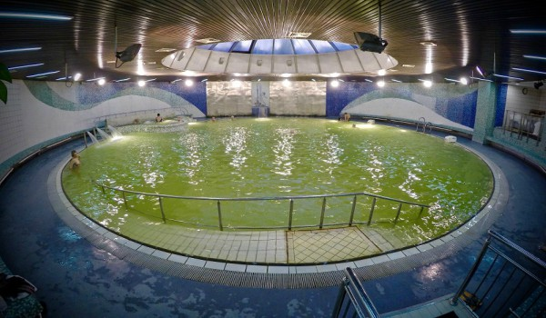 Izgled Aqua centra "Waterfall".